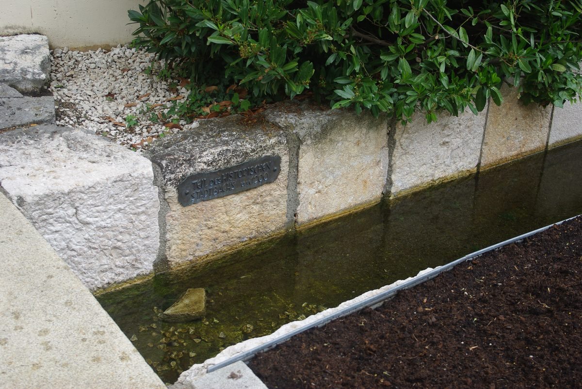 Teil des alten Stadtbachs aus dem Mittelalter in der Poststraße in 83435 Bad Reichenhall